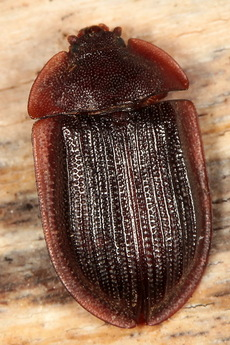 Ostoma ferruginea (Linnaeus, 1758)